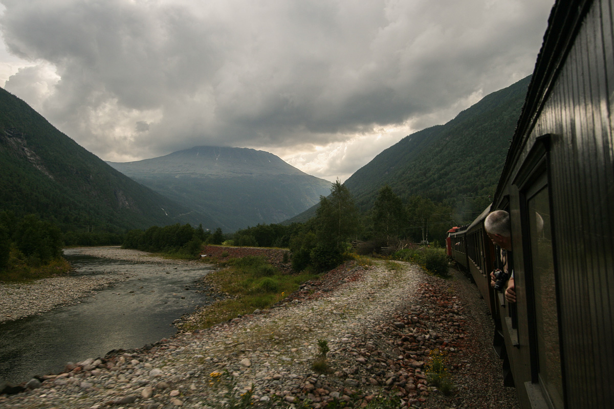 Veterantog på Rjukanbanen i anledning 100-årsjubileet, fotografert nær Miland. Utsikt mot Gaustatoppen.